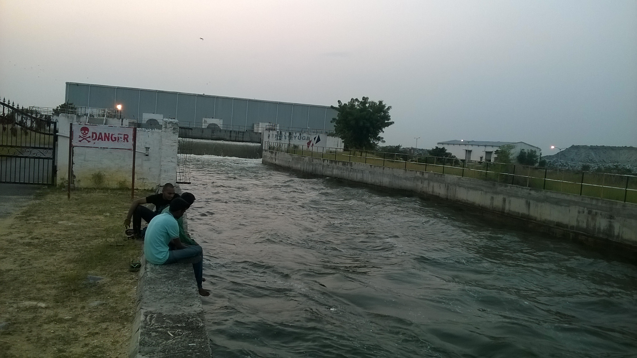 రాజీవ్ భీమా ఎత్తిపోతల పథకం-2, కాలువ